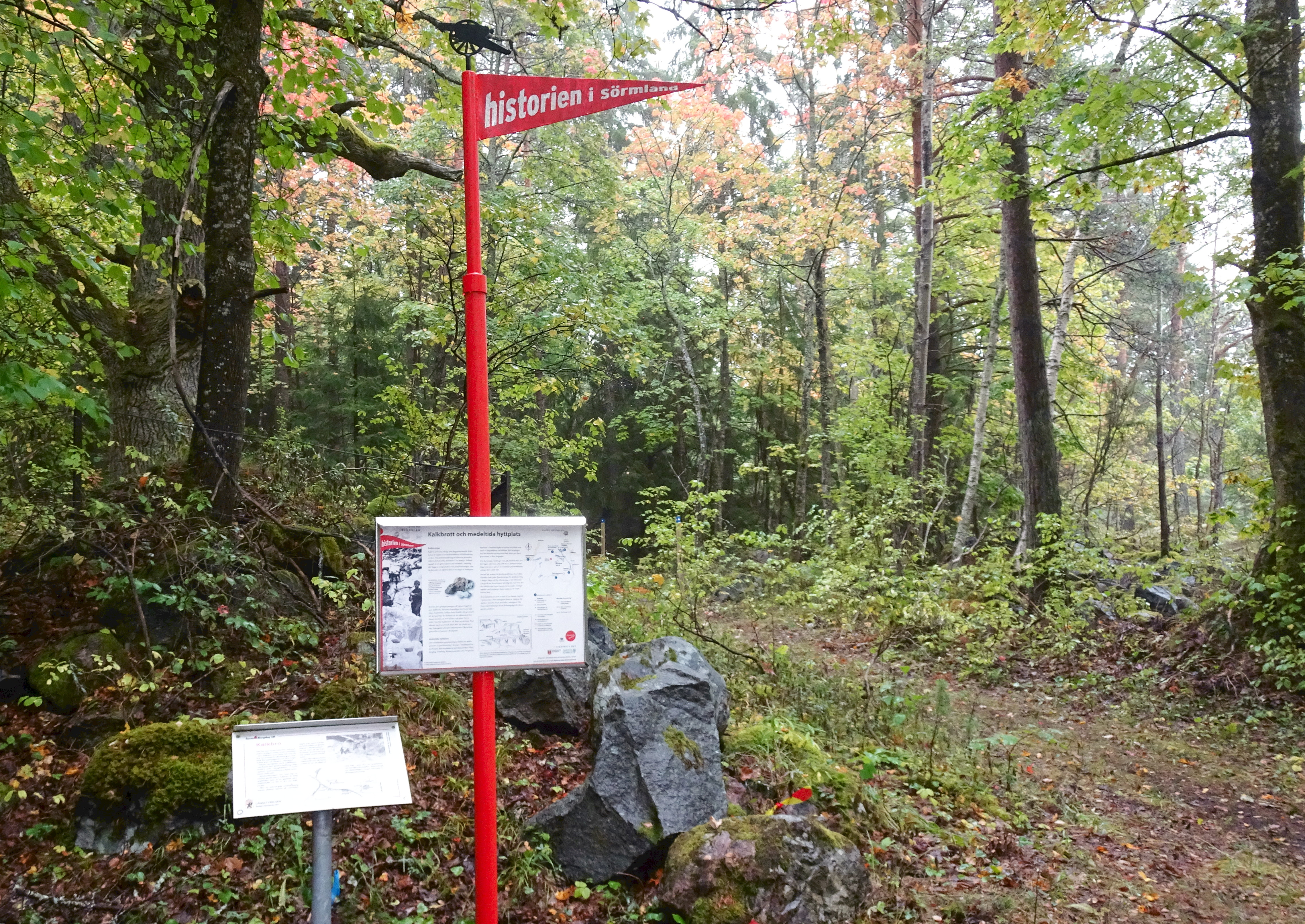 "Historien i Sörmland" skylt vid Kalkbro